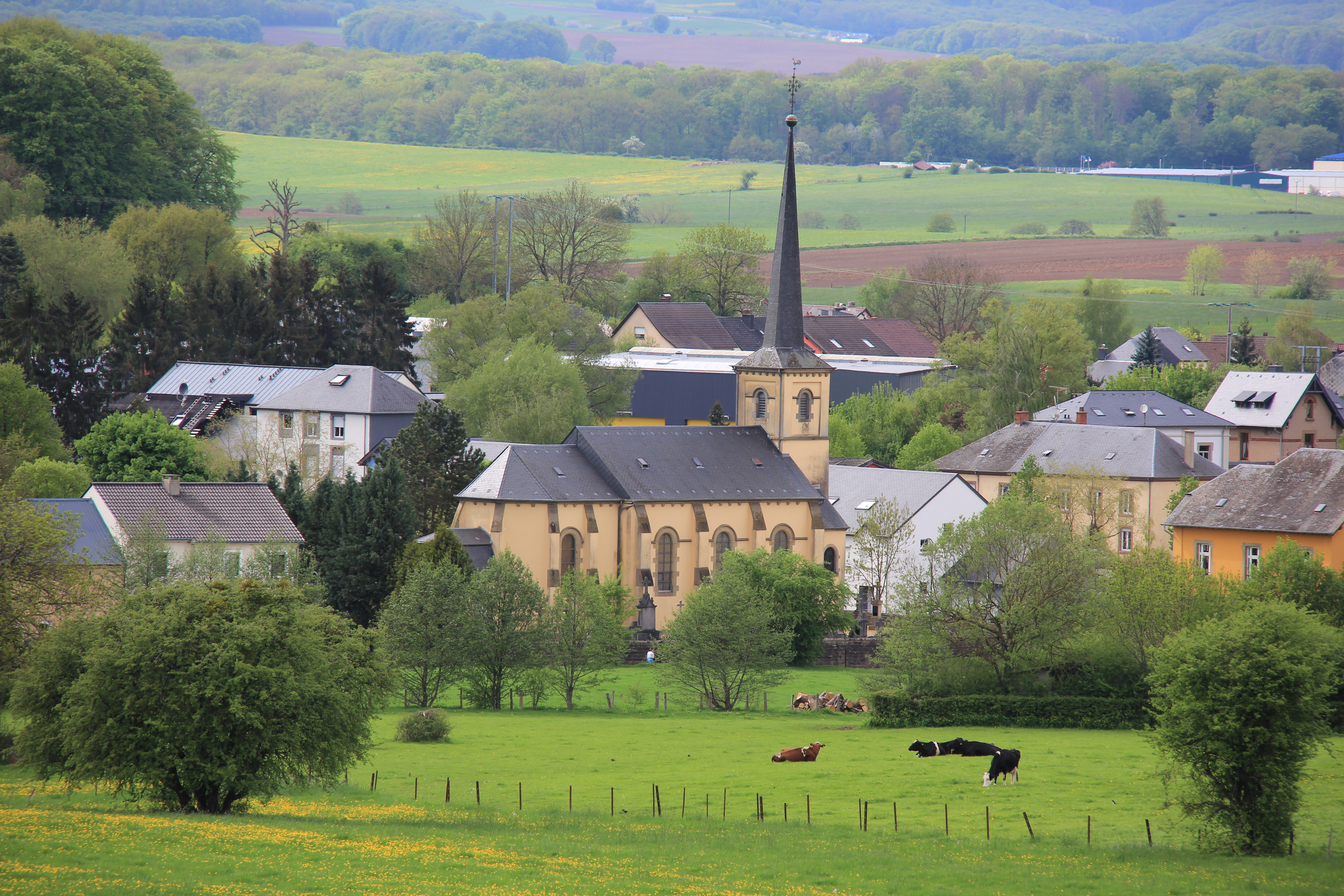 D'Näerdener Kierch vum Héibierg aus gesinn, am Hannergrond Näerden